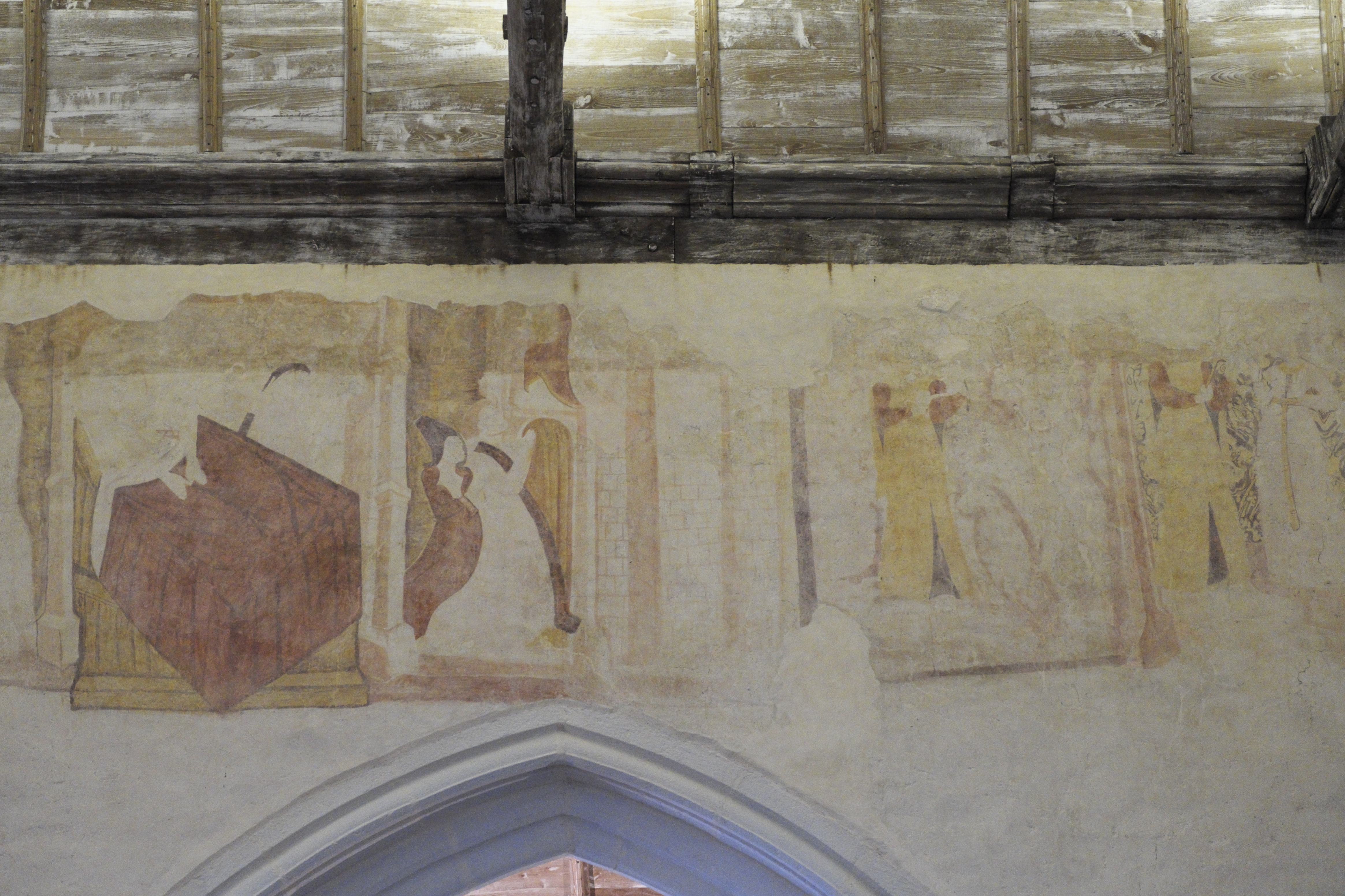 Katholische Pfarrkirche Saint-Salomon in La Martyre im Département Finistère (Region Bretagne/Frankreich), Wandmalerei